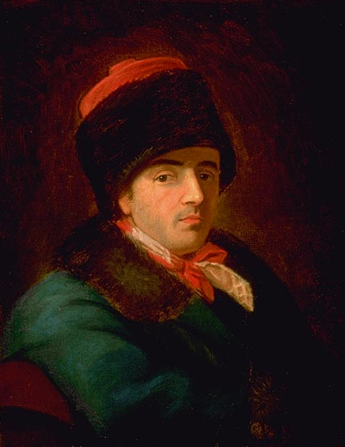 Self-portrait